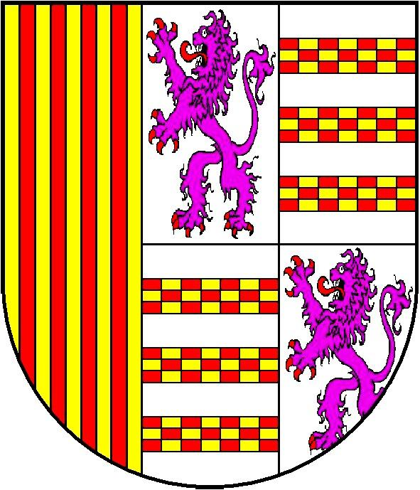 Brasão da Família Lima